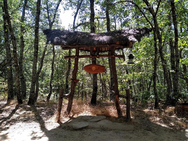 Este es el espacio donde se ubica la madera, que se toca con tres series de golpes en un Templo Zen para anunciar que empieza un Zazen